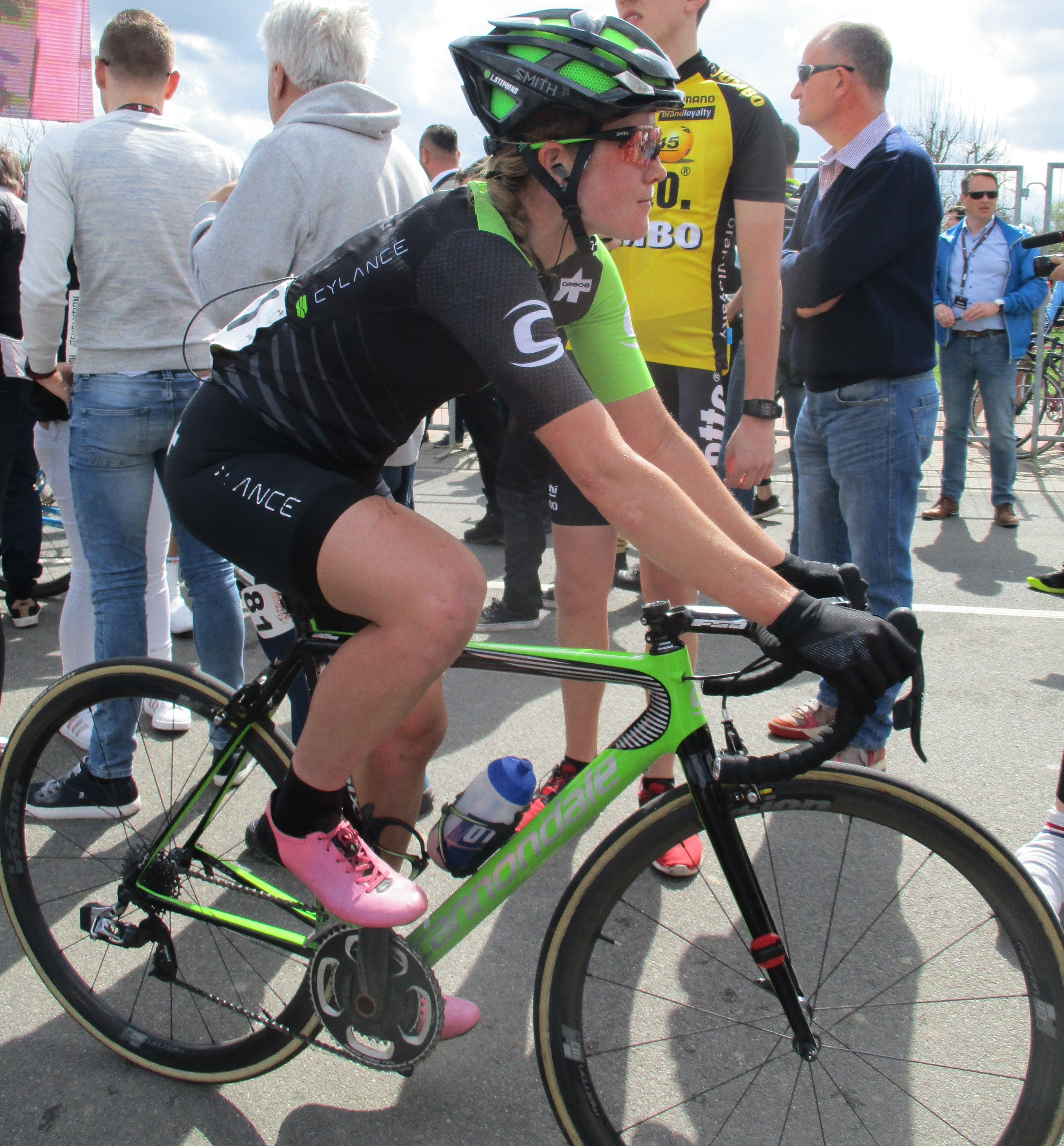 Finish van de Amstel Gold Race Ladies Edition 2018 in Berg, Valkenburg aan de Geul.